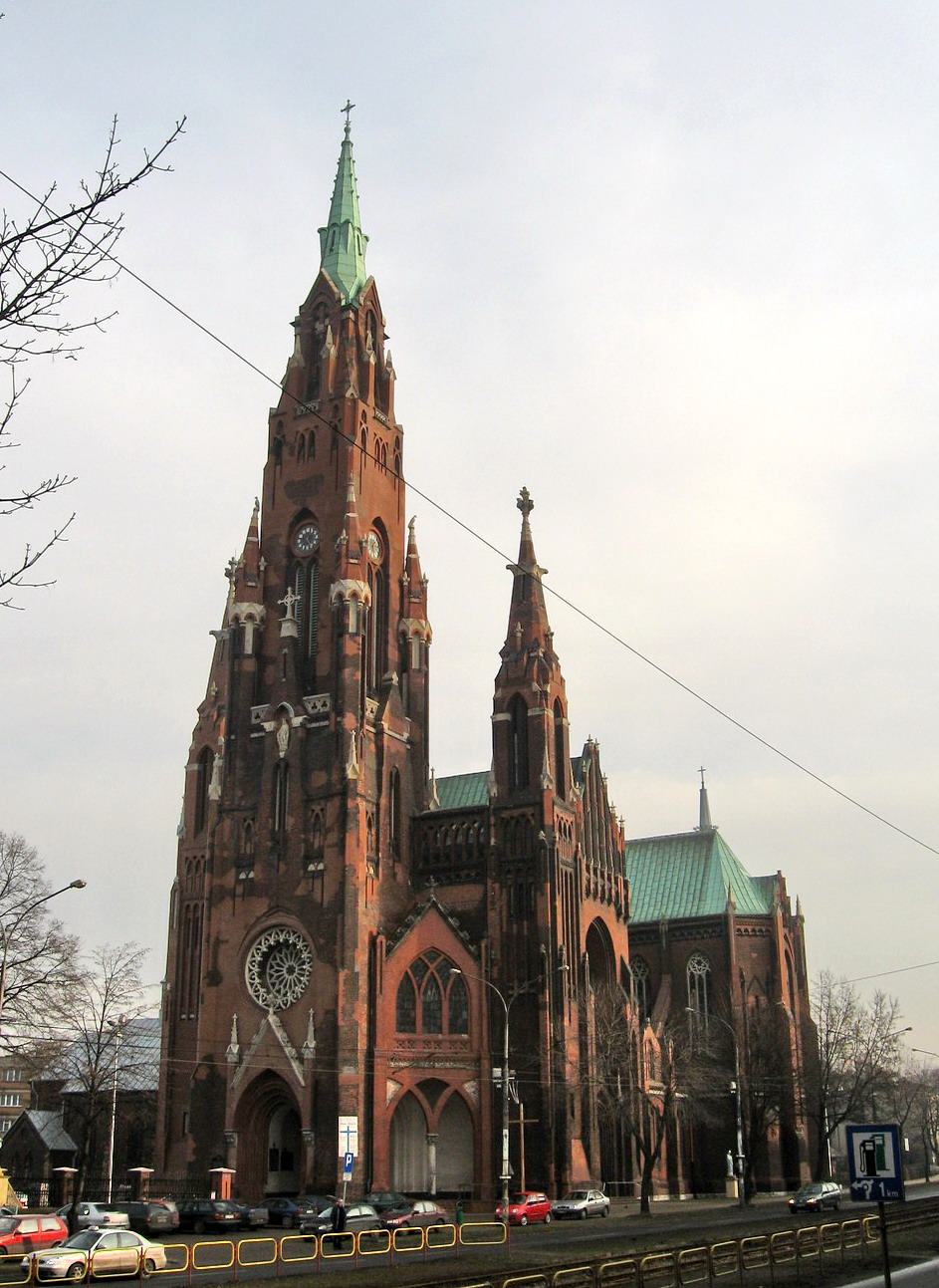 Bazylika NMP Anielskiej w Dąbrowie Górniczej, widok spod siedziby PZU